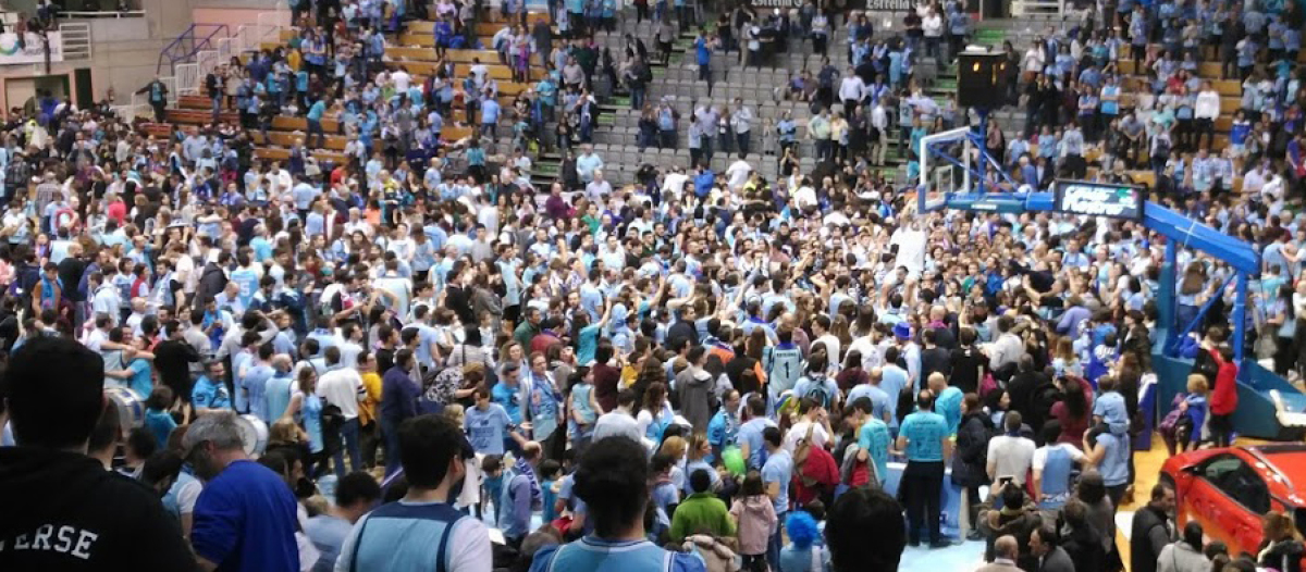 O xogador lucense Sergi Quintela arrinca a rede dunha canastra sobre os ombros de Salva Arco ao remate do encontro.